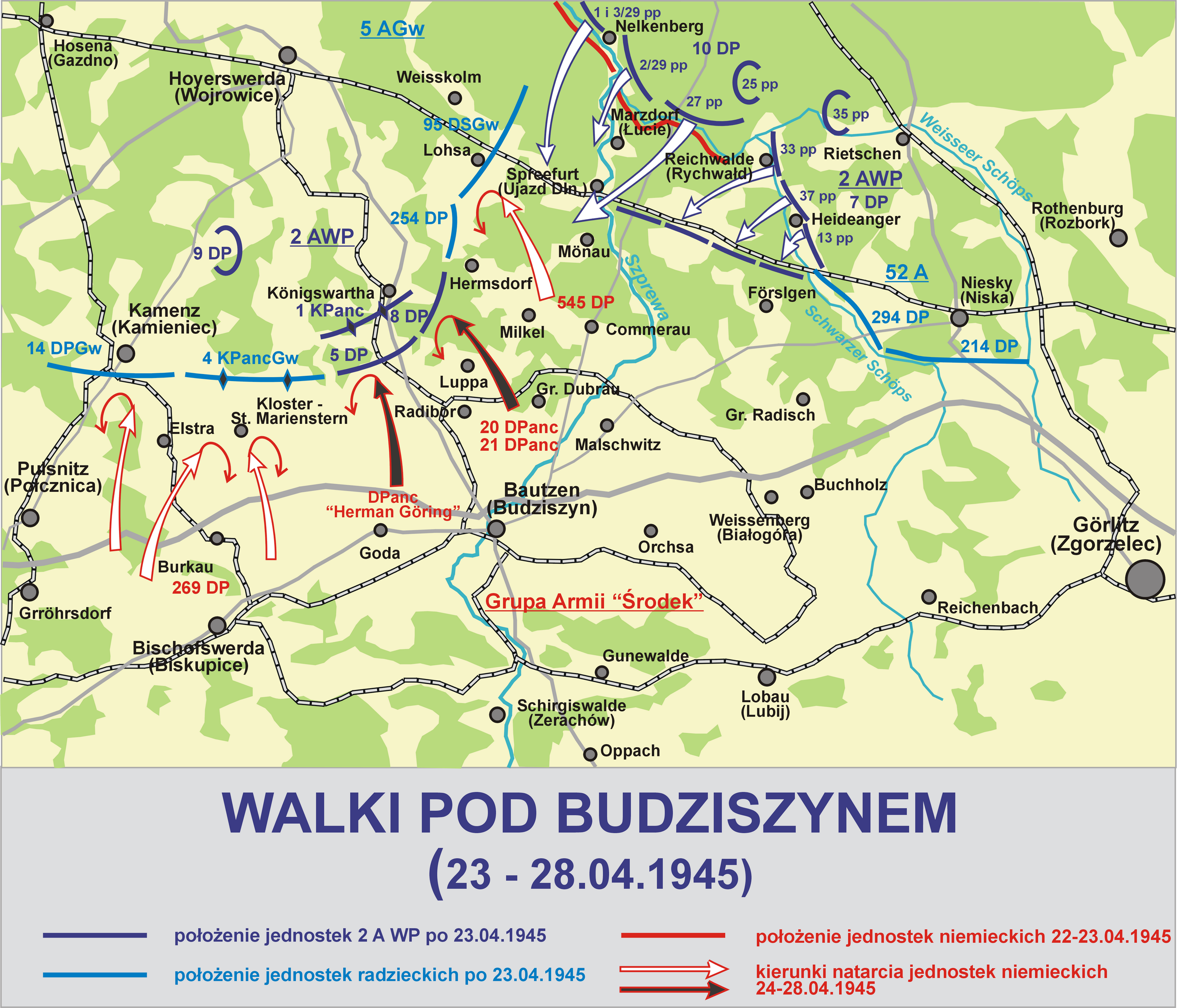 Walki pod Budziszynem (Bautzen) - 21-22.04.1945